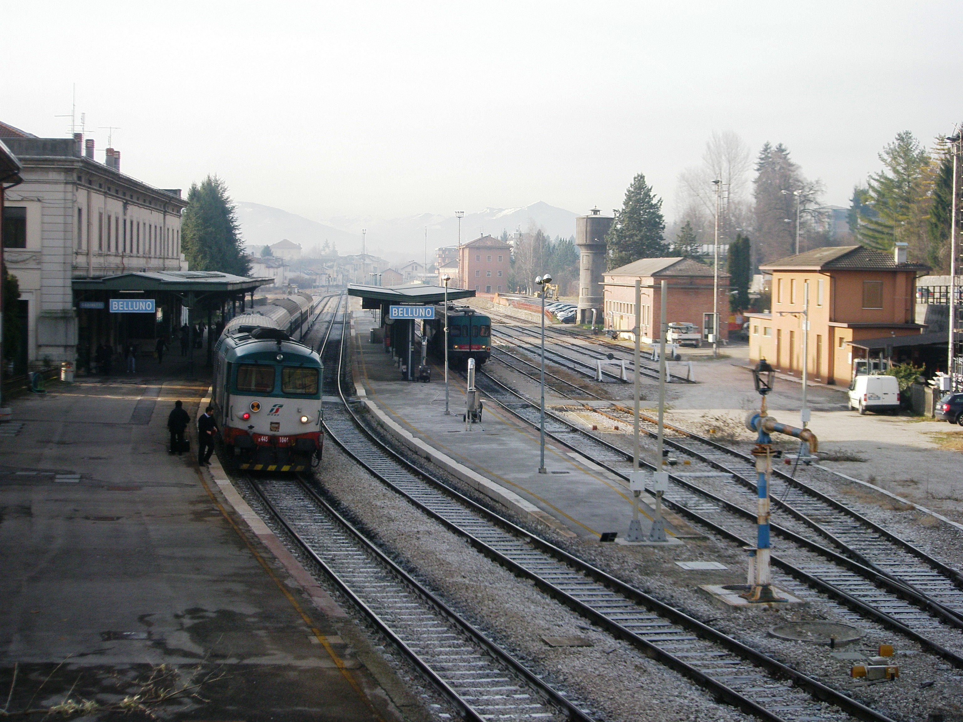 La stazione di Belluno: veduta sui binari